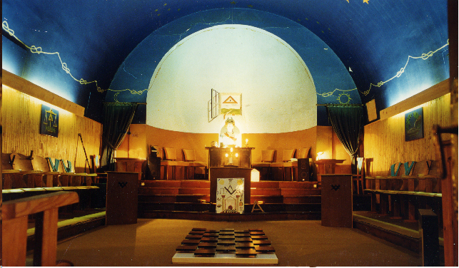 Temple de Ribérac avant les travaux de rénovation